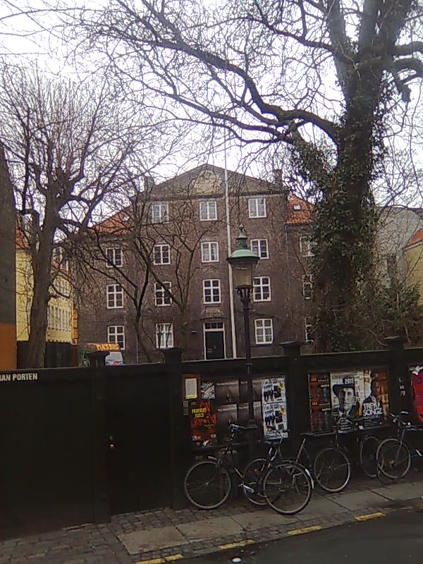 Valkendorfs Kollegium, Sankt Peders Stræde, København